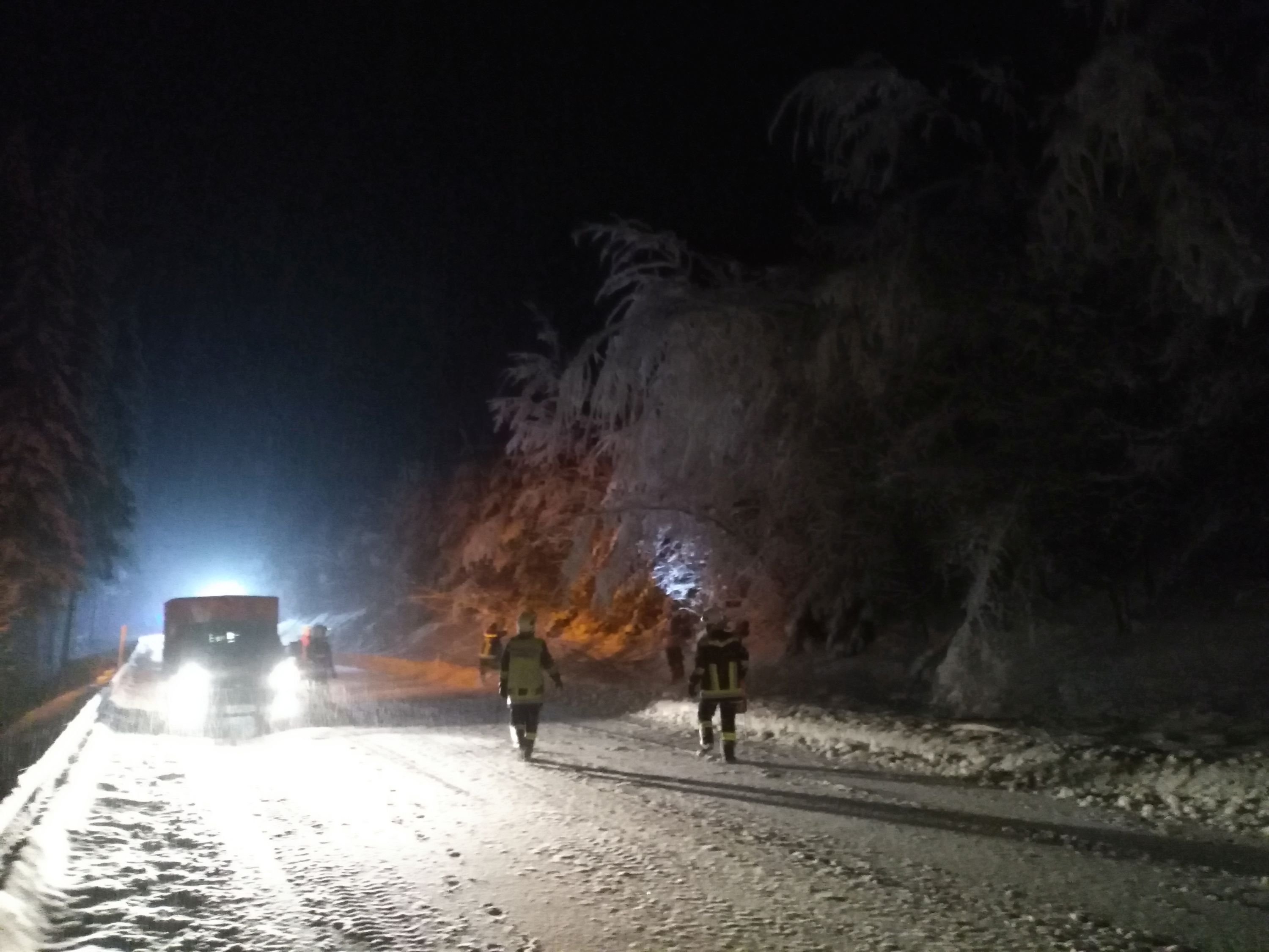 Gefahr von Baumbruch durch Schneelast in Stiftung